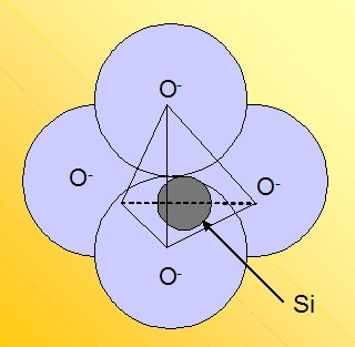 tetraedro egitura